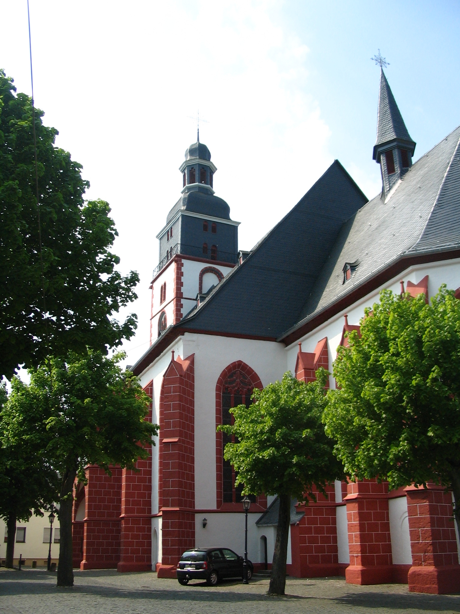 kath. St. Michaels Kirche in Kirchberg Hunsrück